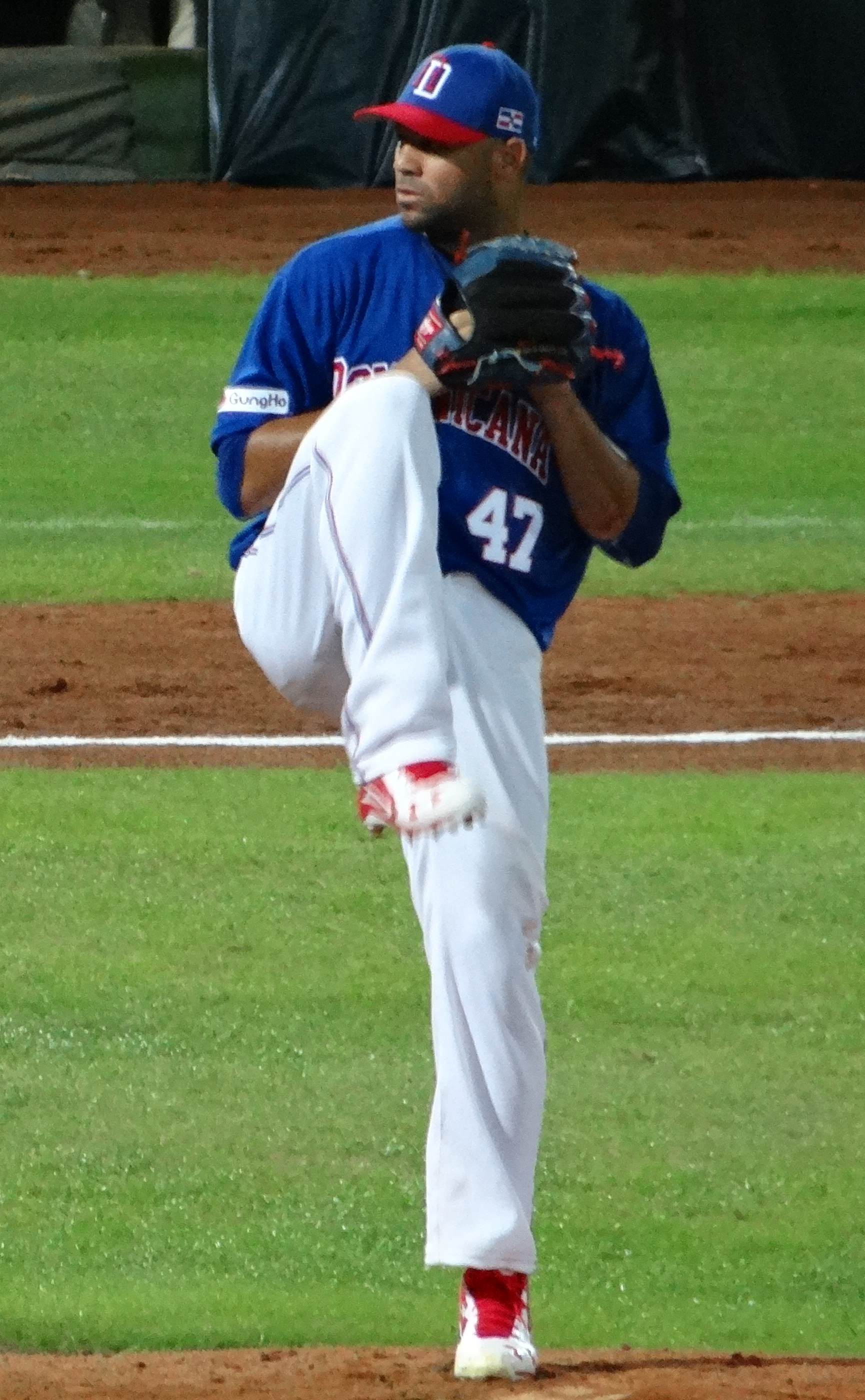 Luis Pérez